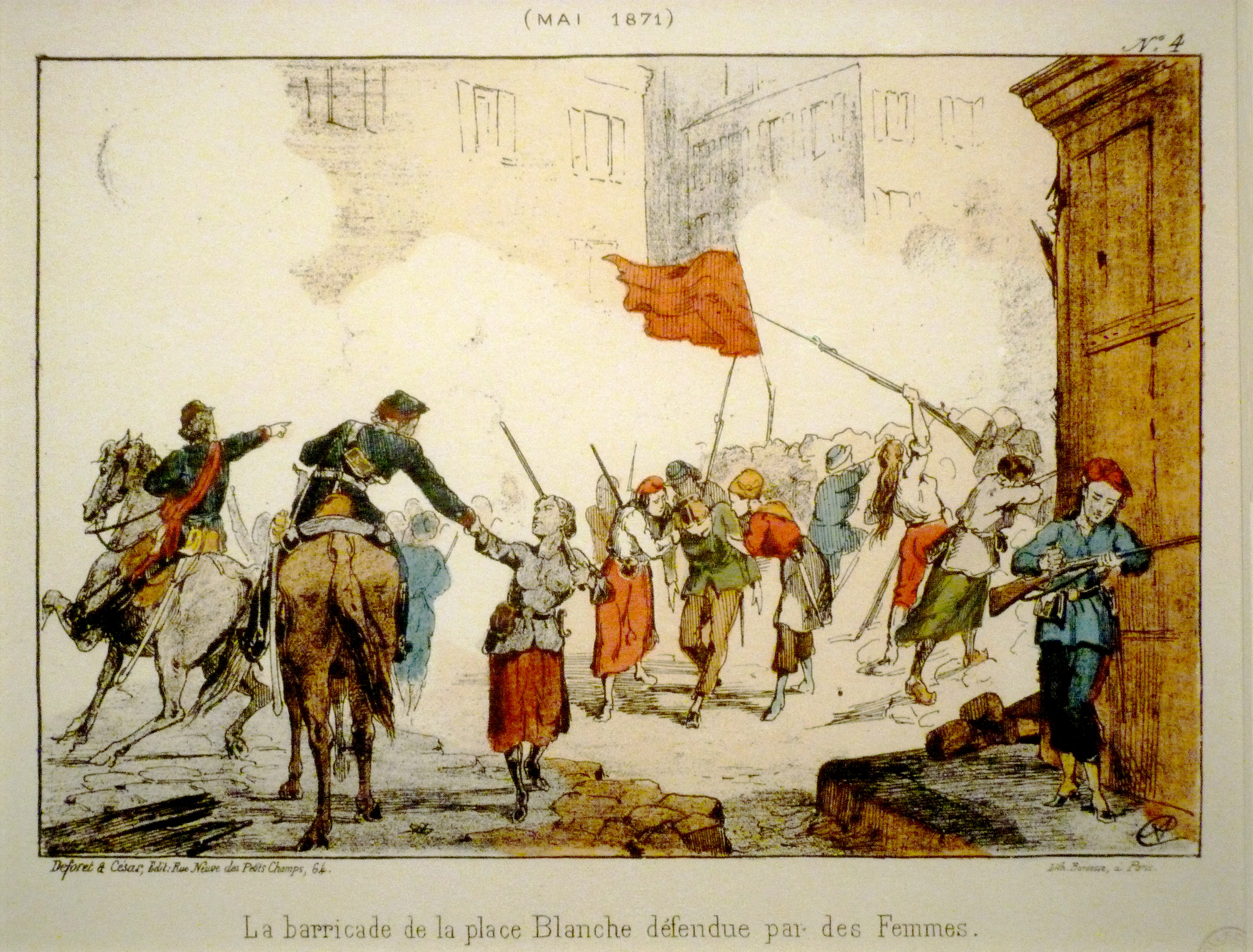 Exposition La Commune de Paris à l'Hôtel de Ville de Paris (18 mars - 28 mai 2011) - Barricade de la Place Blanche, défendue par des femmes pendant la semaine sanglante - Lithographie - Musée Carnavalet